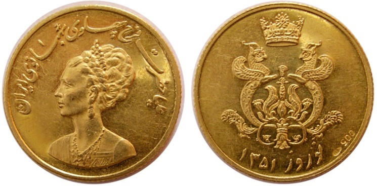 سکه یادبود نوروز با تصویر فرح در رو و نشان مخصوص شهبانو در پشت